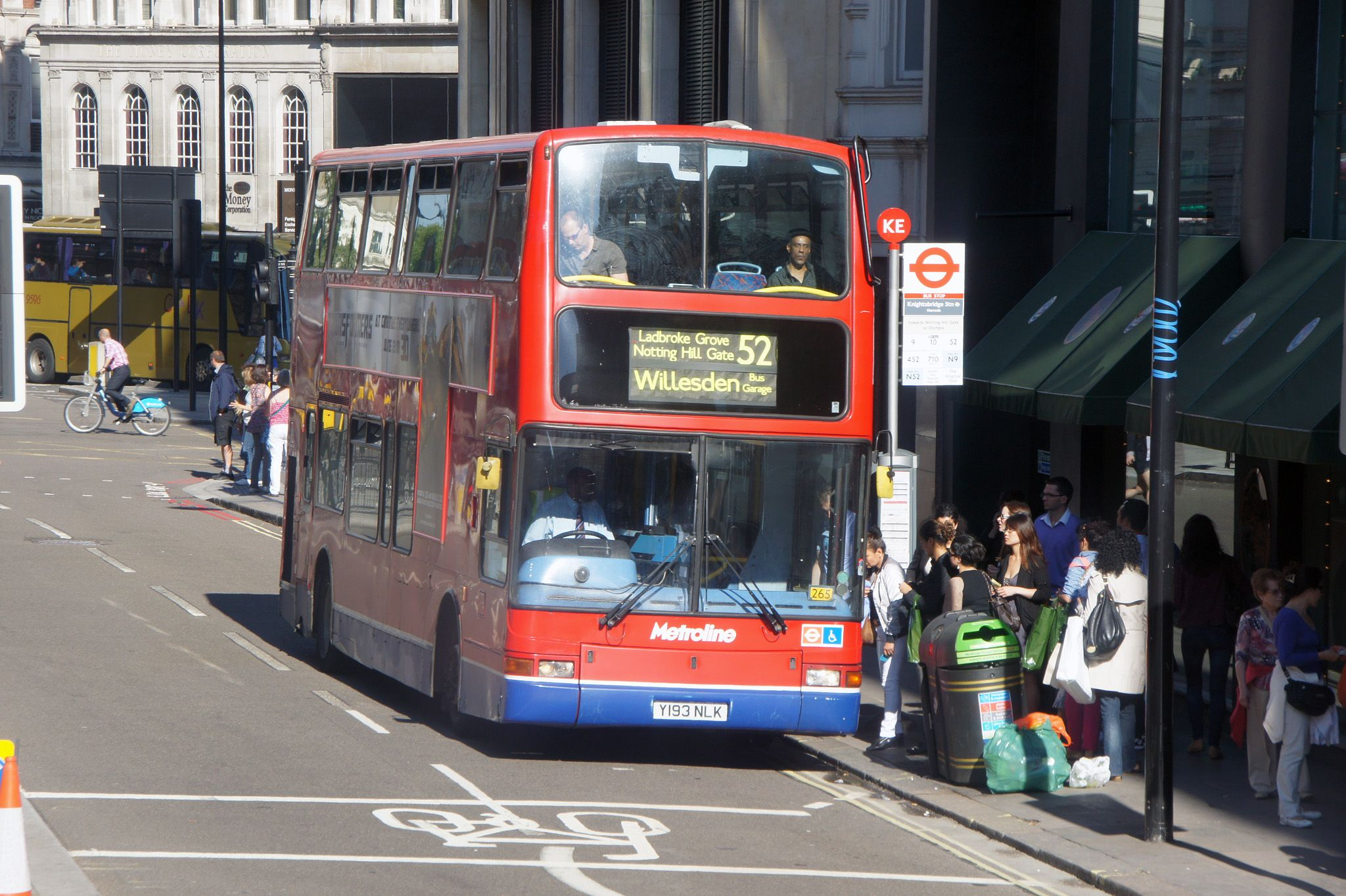 Y193NLK 250611 CPS